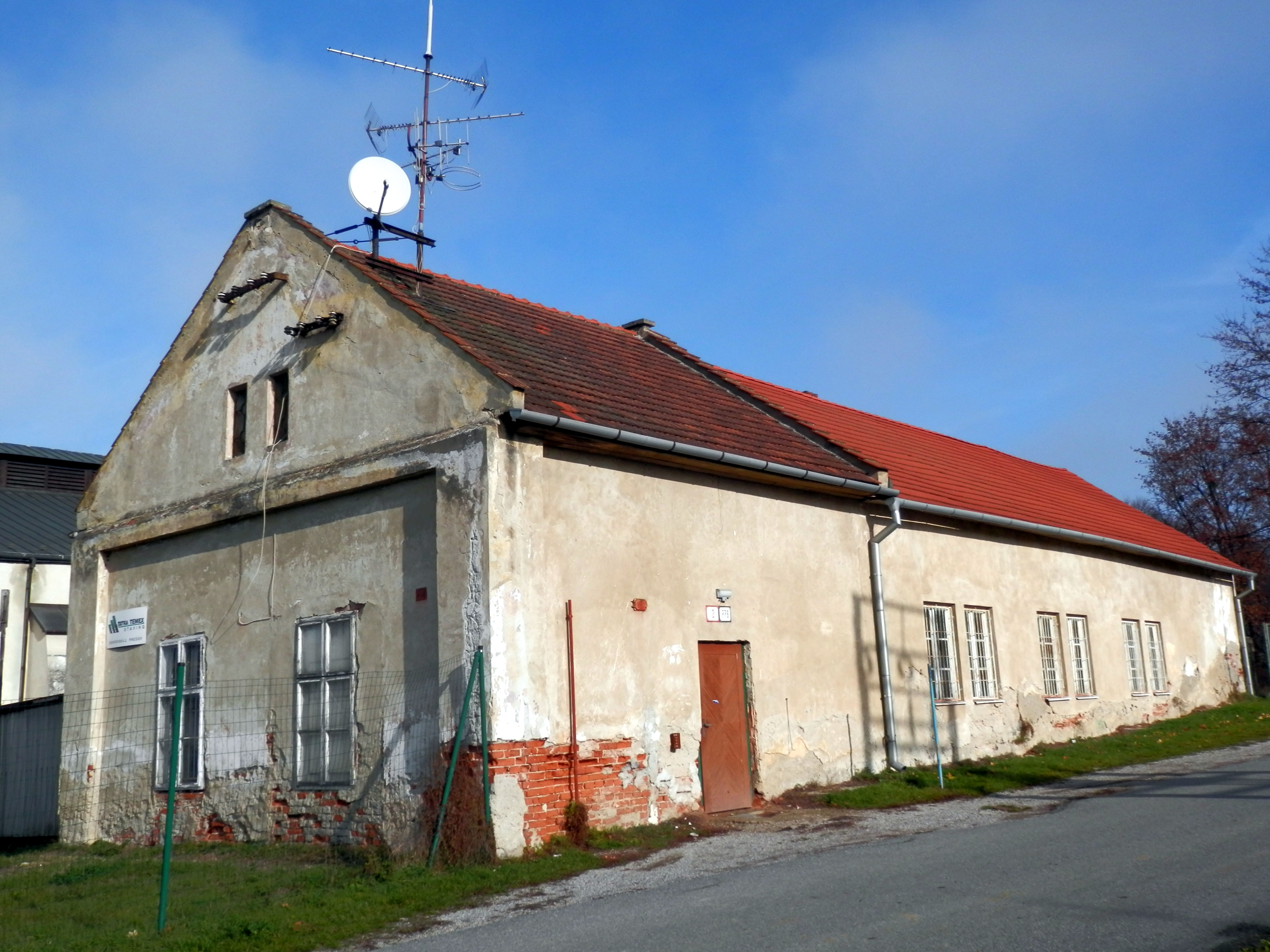 Solivar ulica Zborovská 2. Mesto Prešov. Národná kultúrna pamiatka